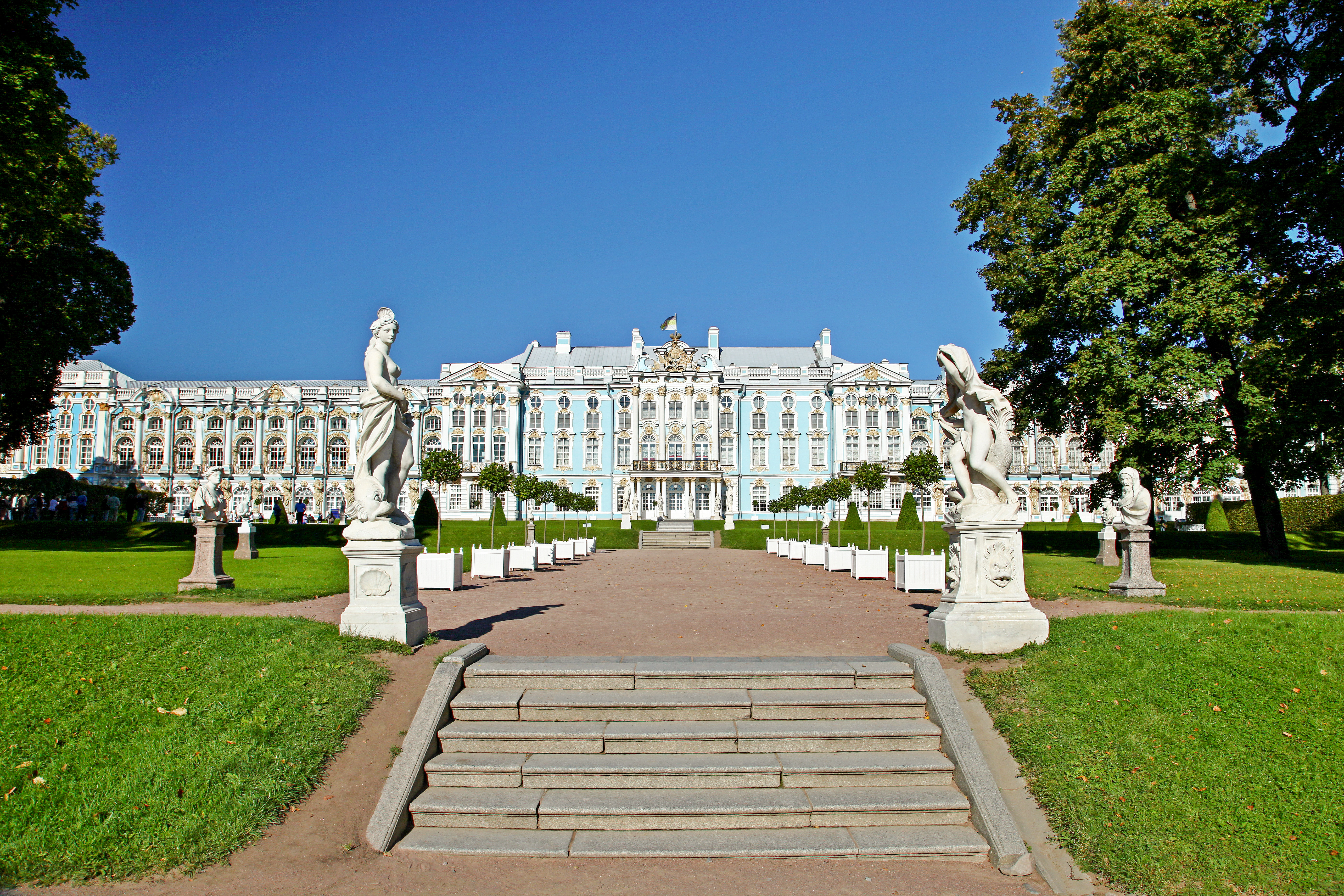 Государственный художественно-архитектурный дворцово-парковый музей-заповедник 'Царское Село': Пушкин, Пушкинский район, Санкт-Петербург This image is related to the protected area of Russia number 7800008